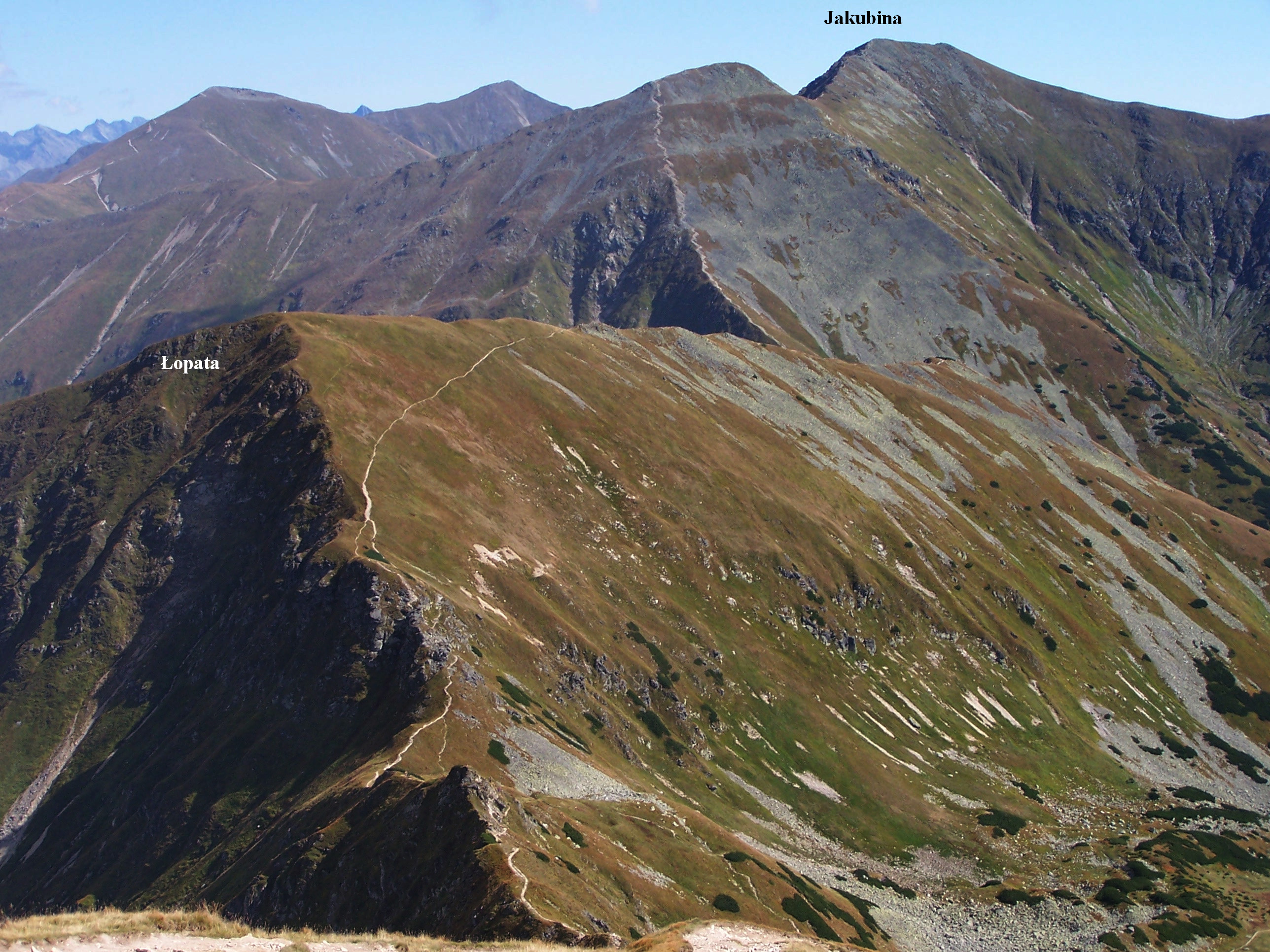 Jakubina (Raczkowa Czuba), Jarząbczy Wierch, w dole Łopata, u góry Starorobociański Wierch i Bystra - West Tatra Mountains